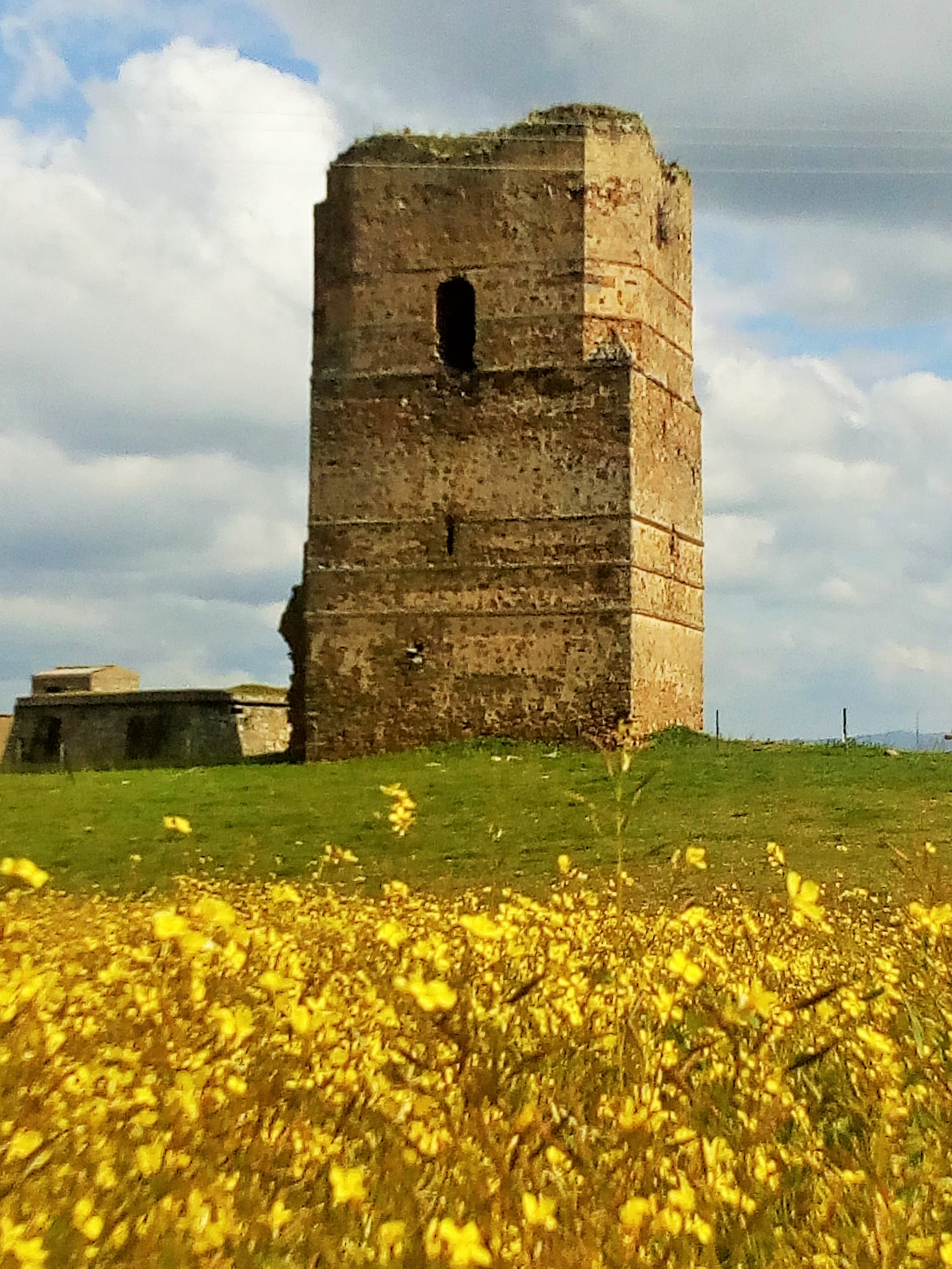 Torreón Defensivo del siglo XV construido por Alonso de Cardenas conocido como El Castillo